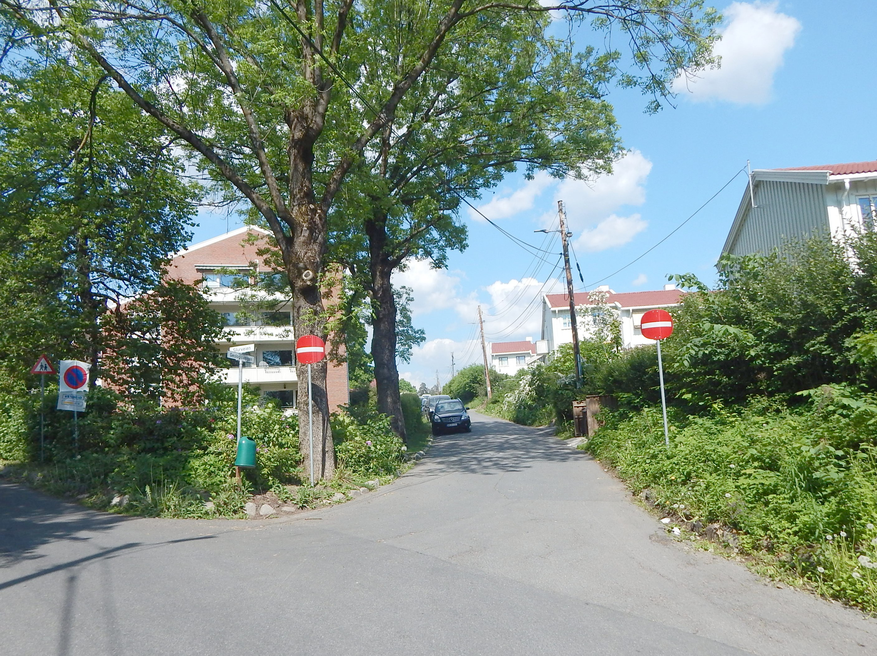 Geologsvingen